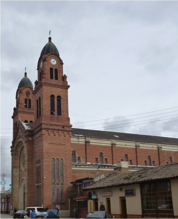 Iglesia Maria auxiliadora vista lateral